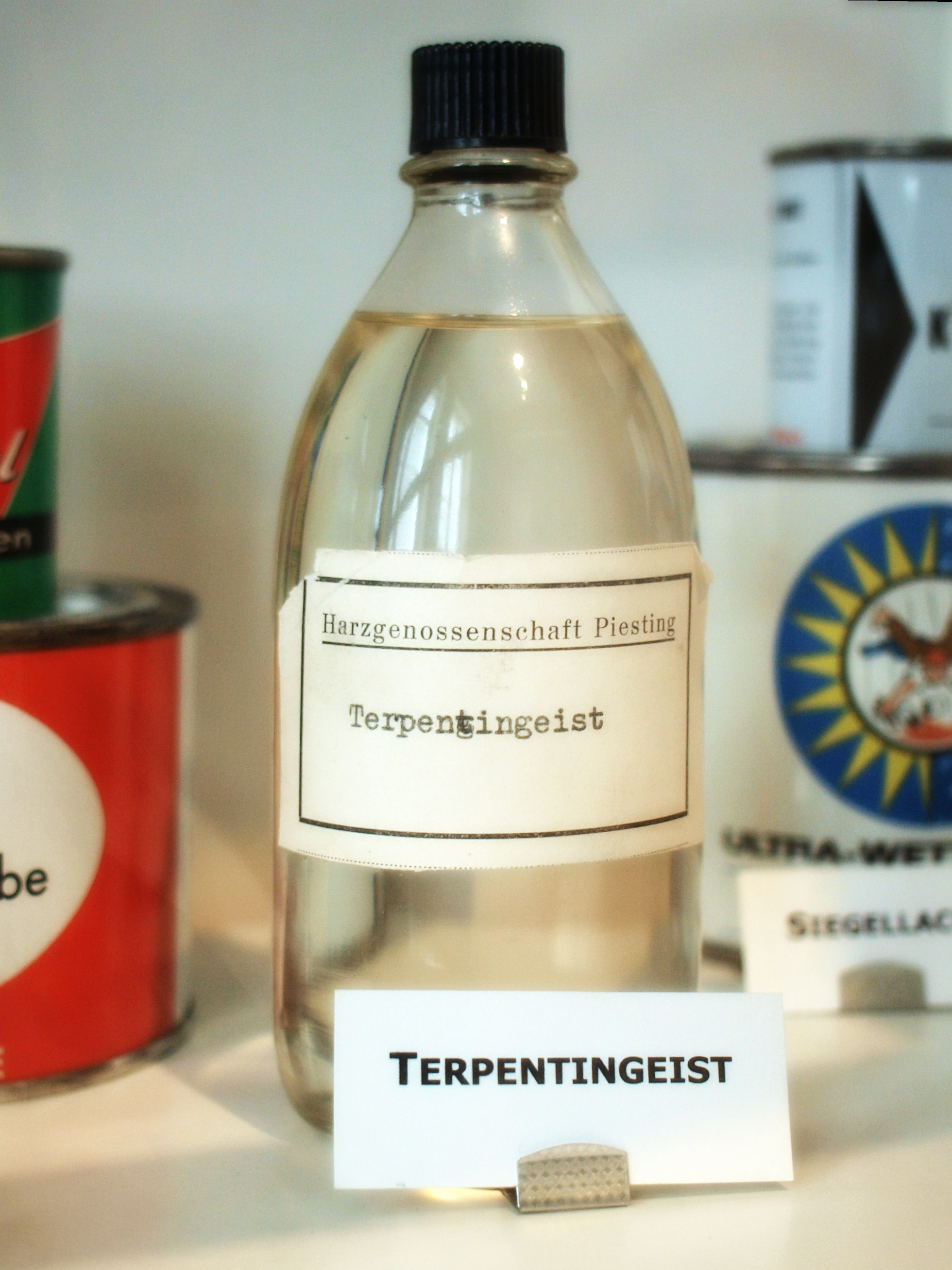 im Stadtmuseum Bad Vöslau